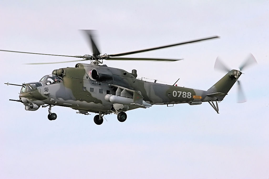 Mil Mi 24 - RIAT 2007